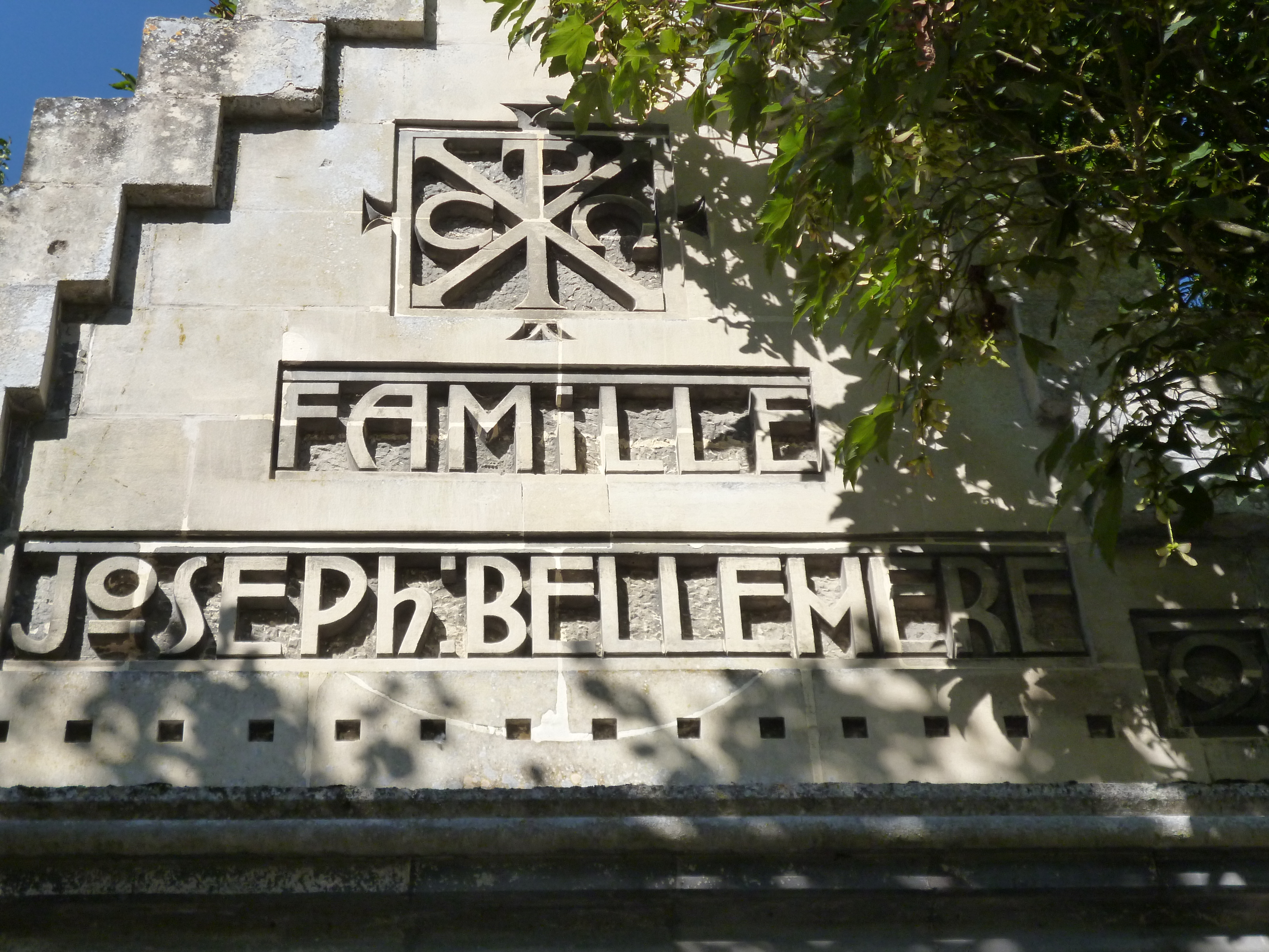 Chapelle funéraire de la famille Bellemère, connue aussi sous le nom de Chapelle de Chepoix, située à Chepoix (Oise, Picardie), classée en 2011